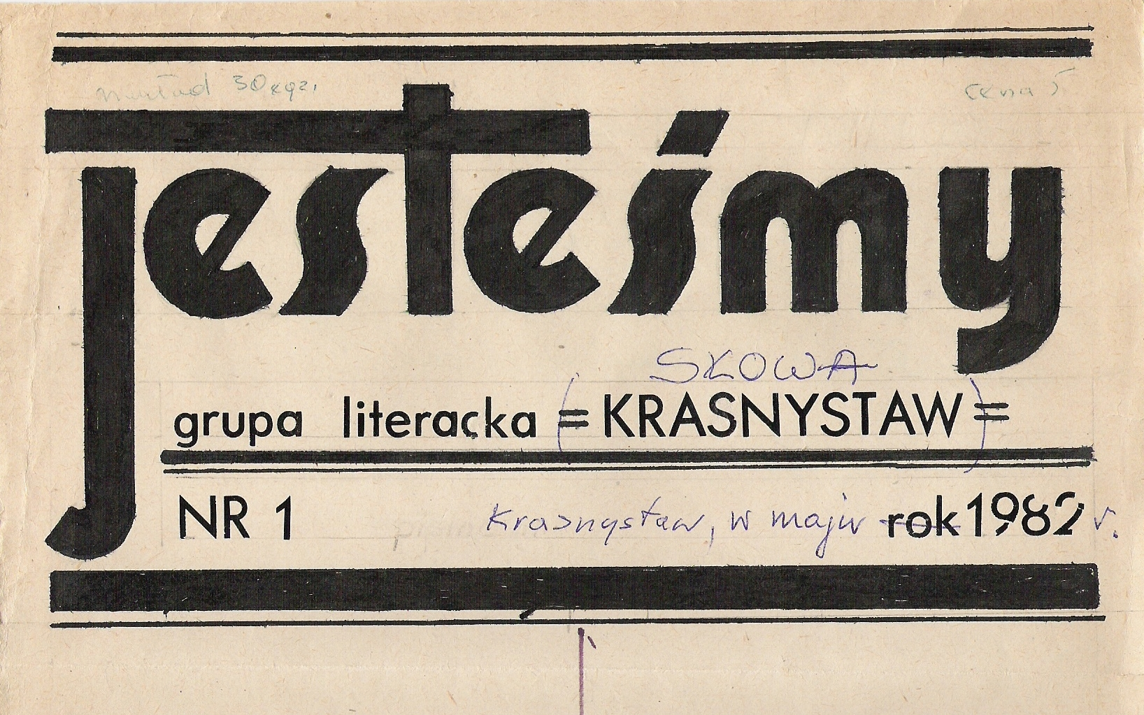 Wersja robocza winiety pisma grupy literackiej "Jesteśmy". Gipsoryt - farba nanoszona była wałkiem i odbitki odciskane były ręcznie - każda. Póżniej teksty pisane były na maszynie.